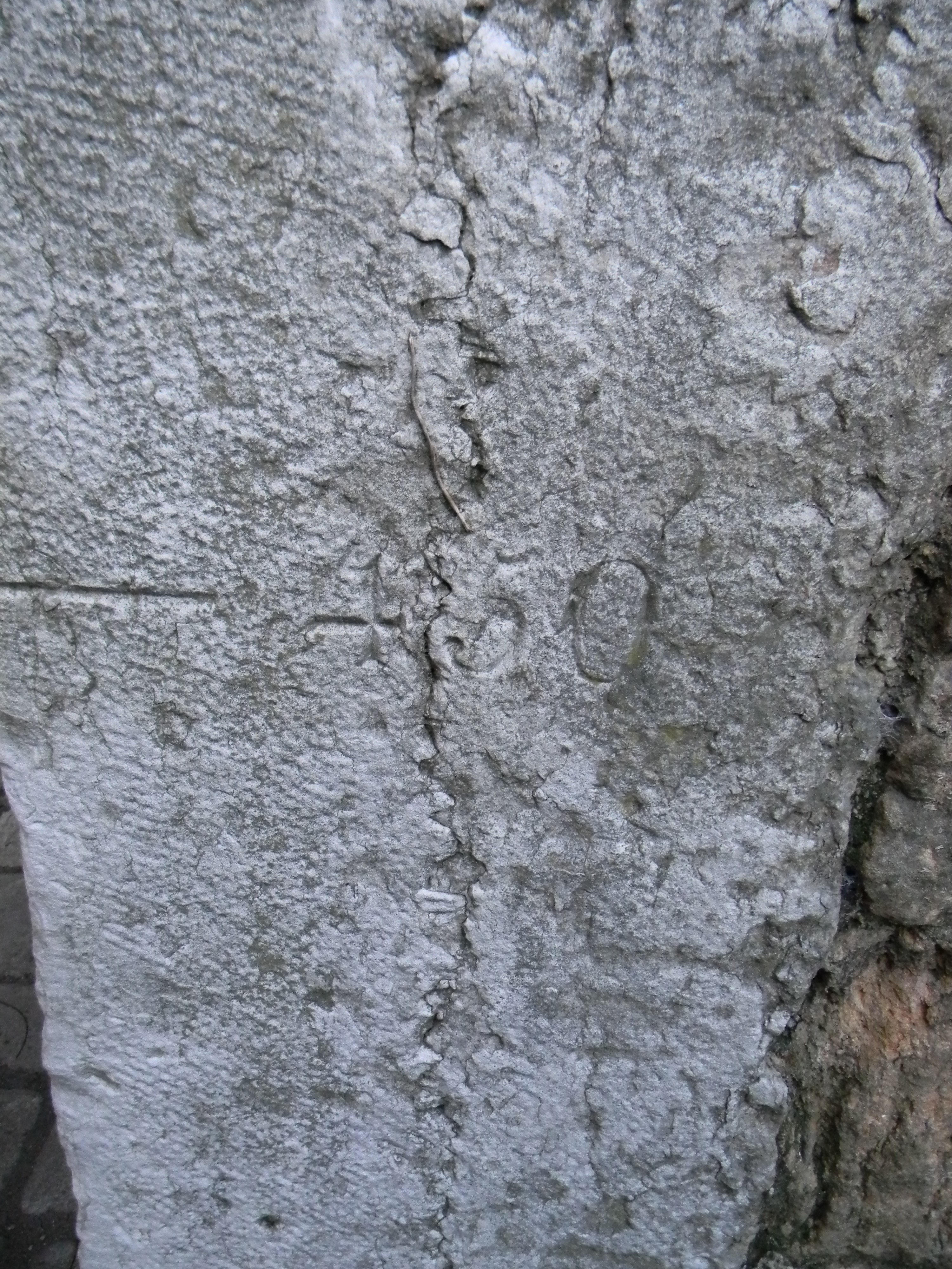 Altitude gravée à l'entrée du Fort de Vaise: 450m (187m par rapport au niveau de la mer). Cette mesure serait faite en fonction du point le plus haut, à savoir ici le Mont Verdun.